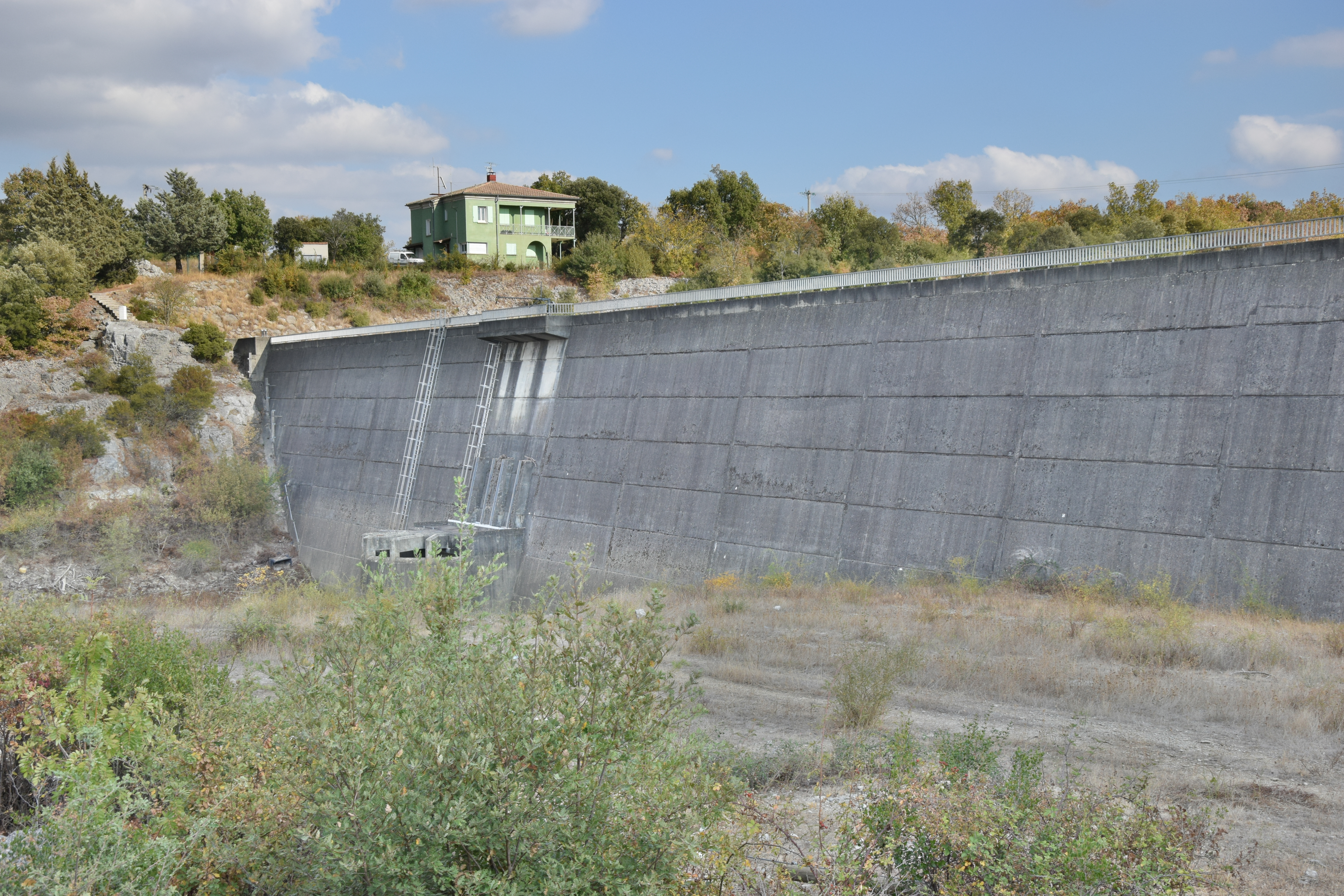 Barrage de Conqueyrac (amont) sur le Vidourle dans la Gard ( Occitanie ). Barrage écrêteur de crues construit en 1982 et propriété du conseil général du Gard. Photo HDR.